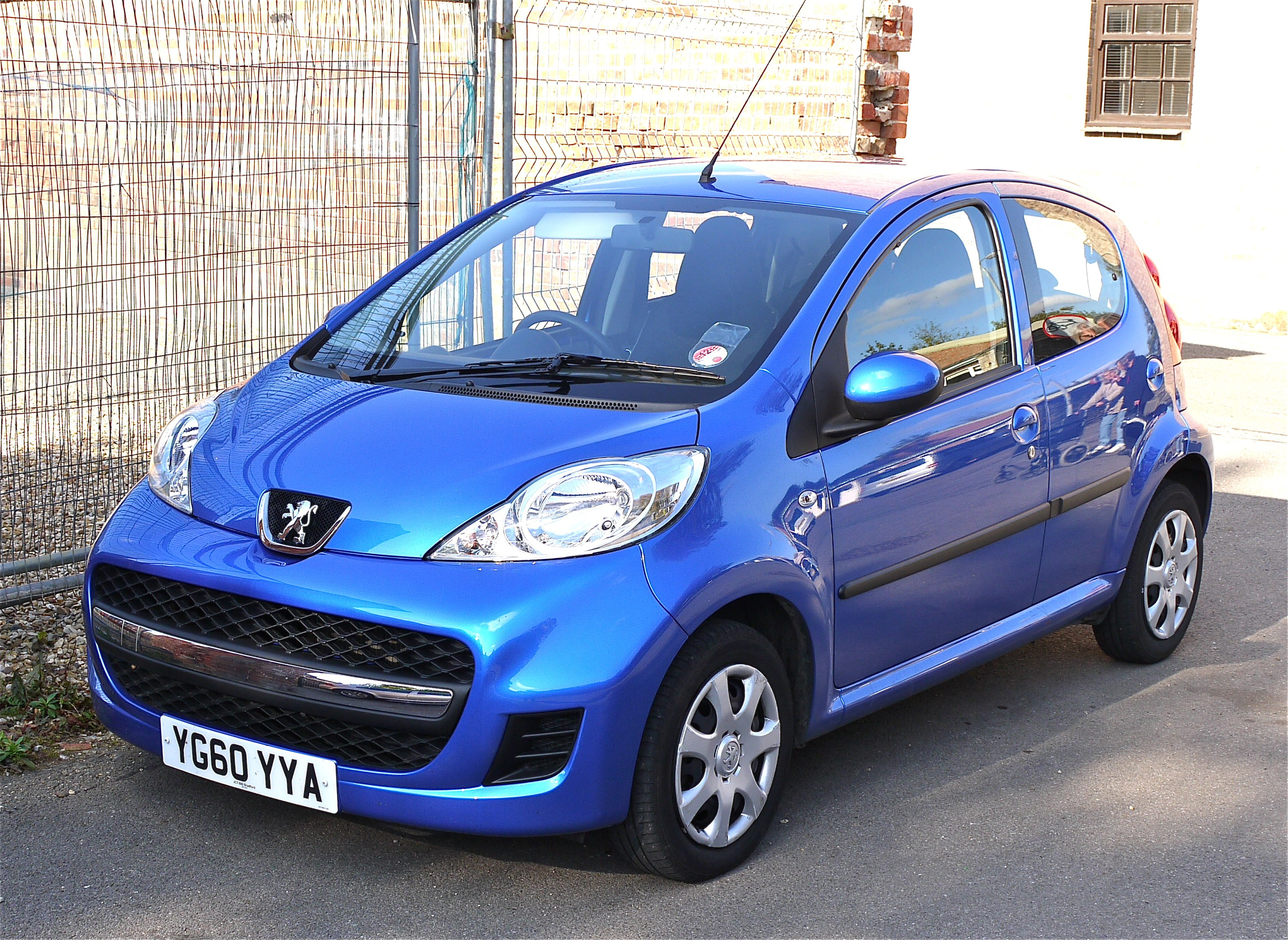 Panasonic G1 14-45 Lens